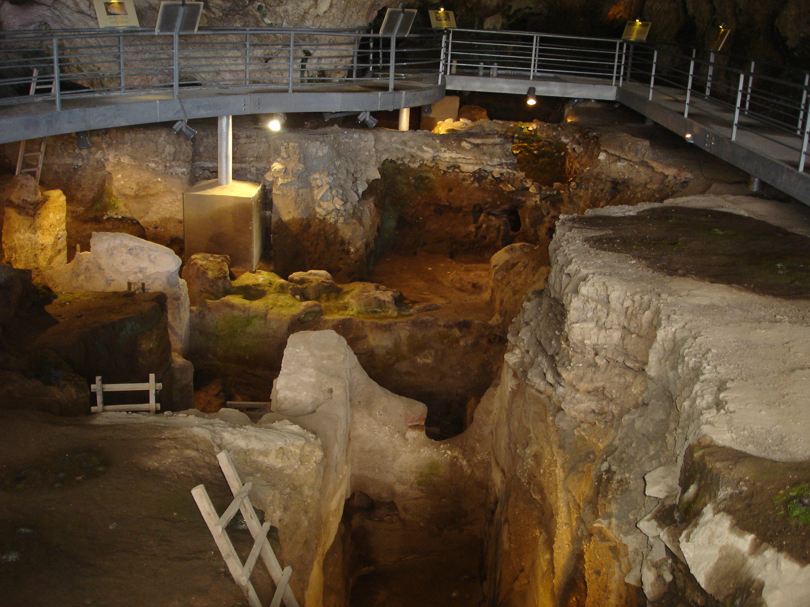 Σπήλαιο Θεόπετρας«Σπήλαιο Θεόπετρας»